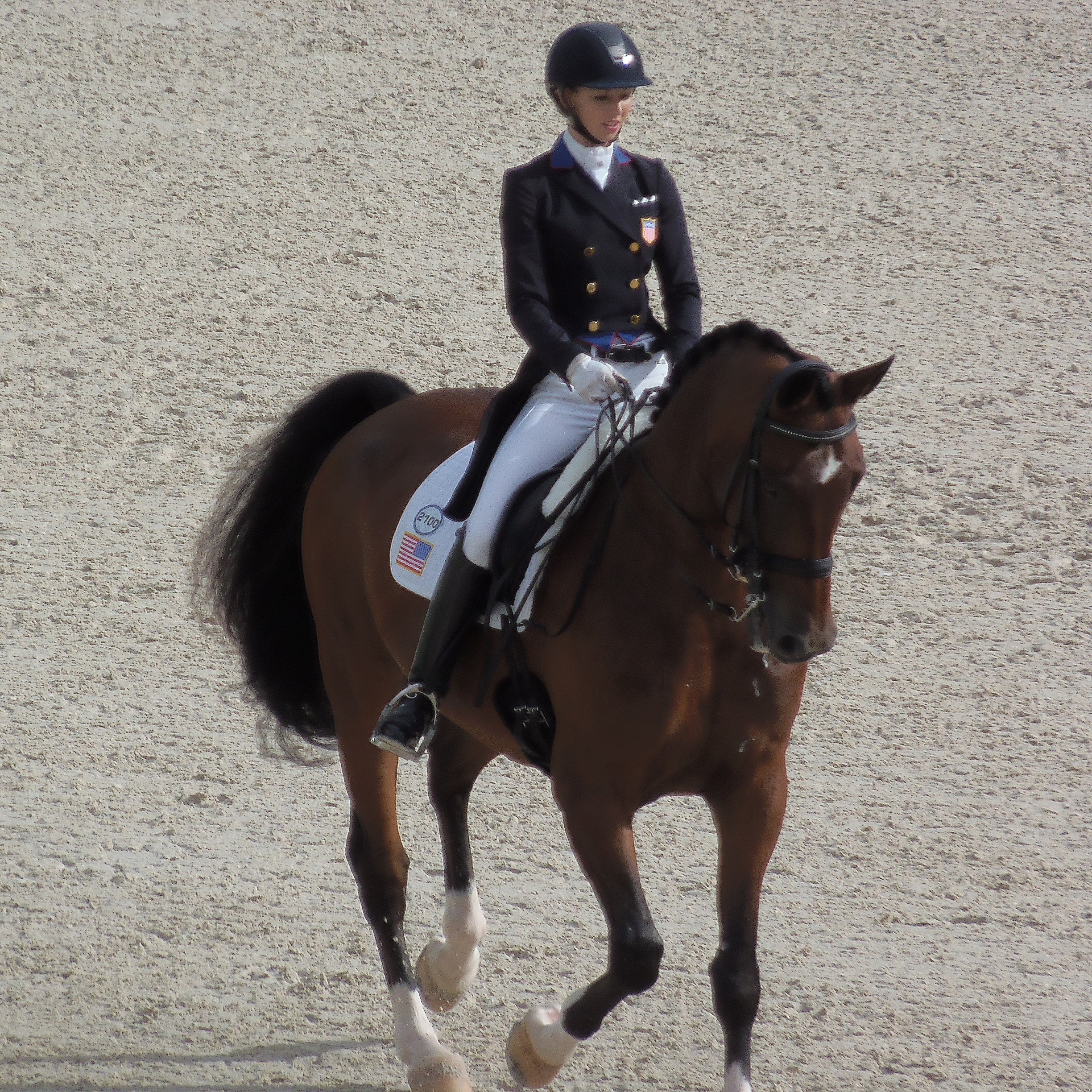 Laura Graves en selle sur Verdades lors des Jeux équestres mondiaux, le 26 août 2014 au stade d'Ornano à Caen (Normandie, France).